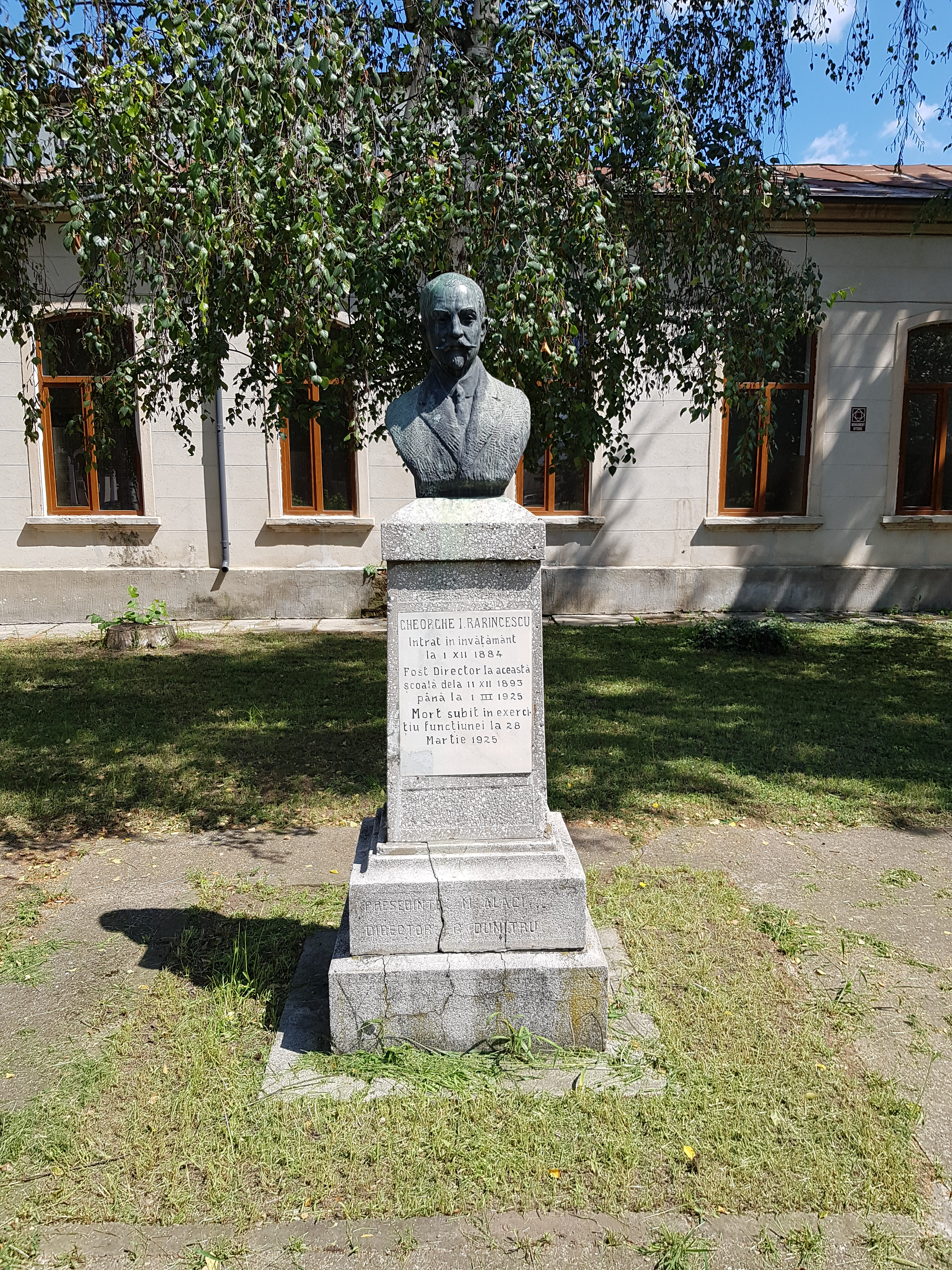 Bustul lui Georghe Rarincescu, Focșani